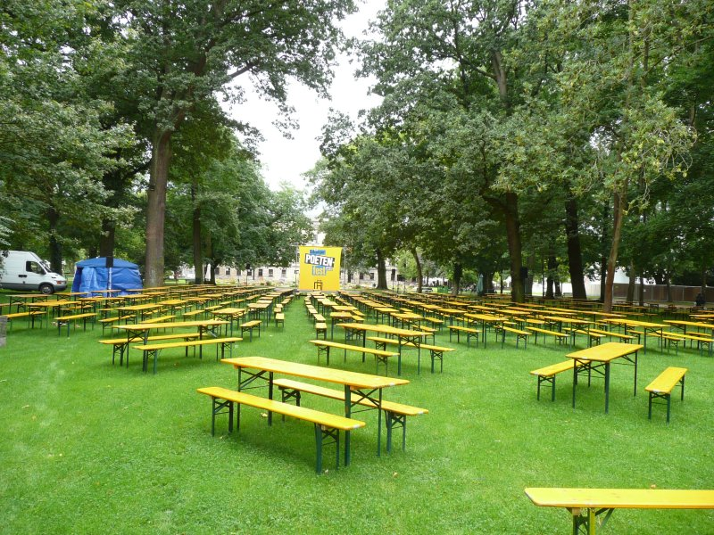 Bühne und Zuschauer-Sitzplätze werden für das Erlanger Poetenfest aufgebaut